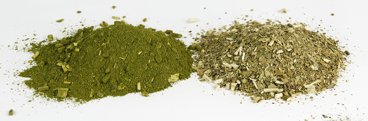 Zdjęcie porównawcze, jak wygląda klasyczna mate chimarrão z Brazylii, a jak wygląda klasyczna Yerba Mate z Argentyny.